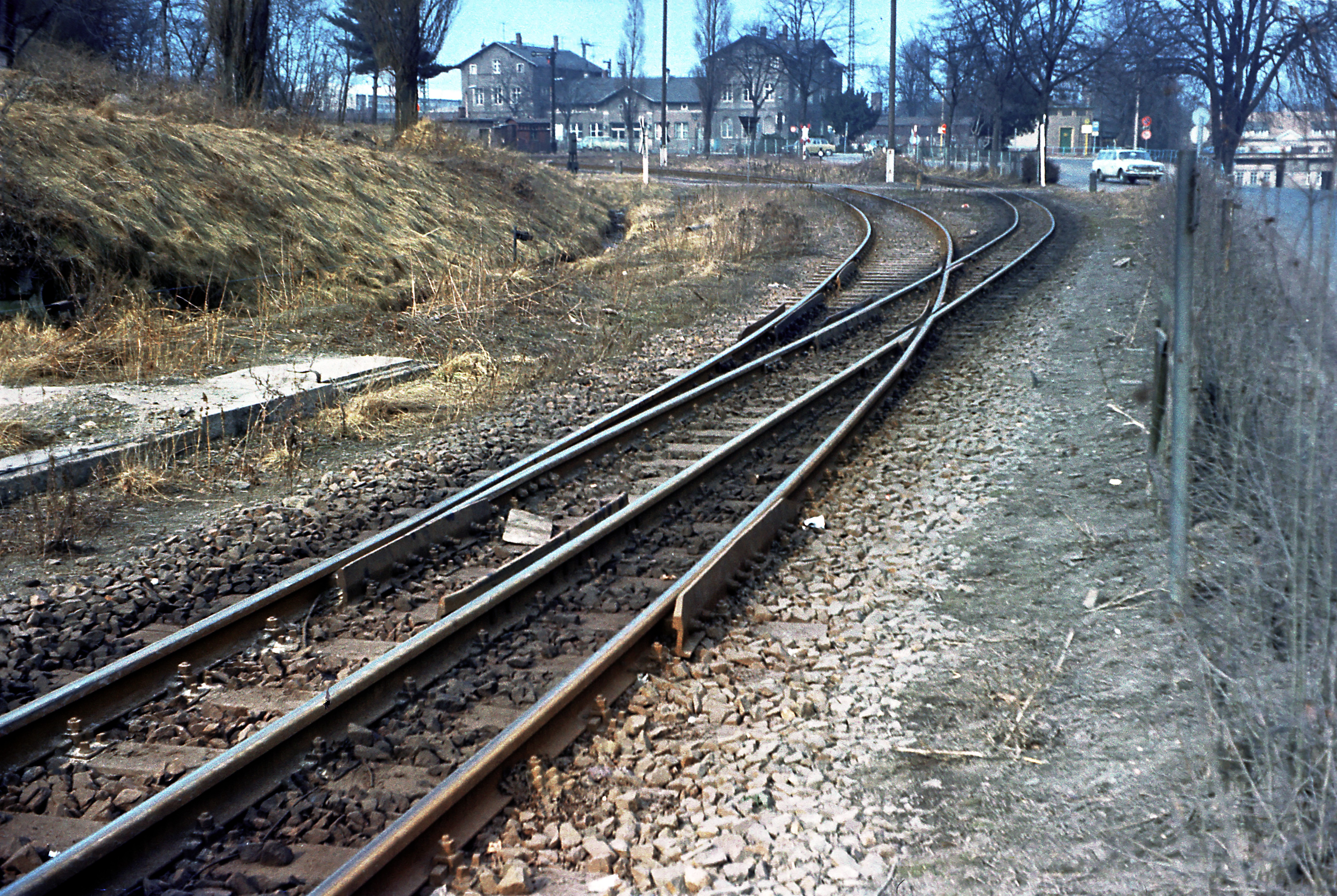 Durch die Radlenker ist die Zusammenführung beider Spurweiten ohne bewegliche Teile möglich. Aufffällig sind die Radlenker auf der Innen- und Außenseite im Bereich des Doppelherzstückes.